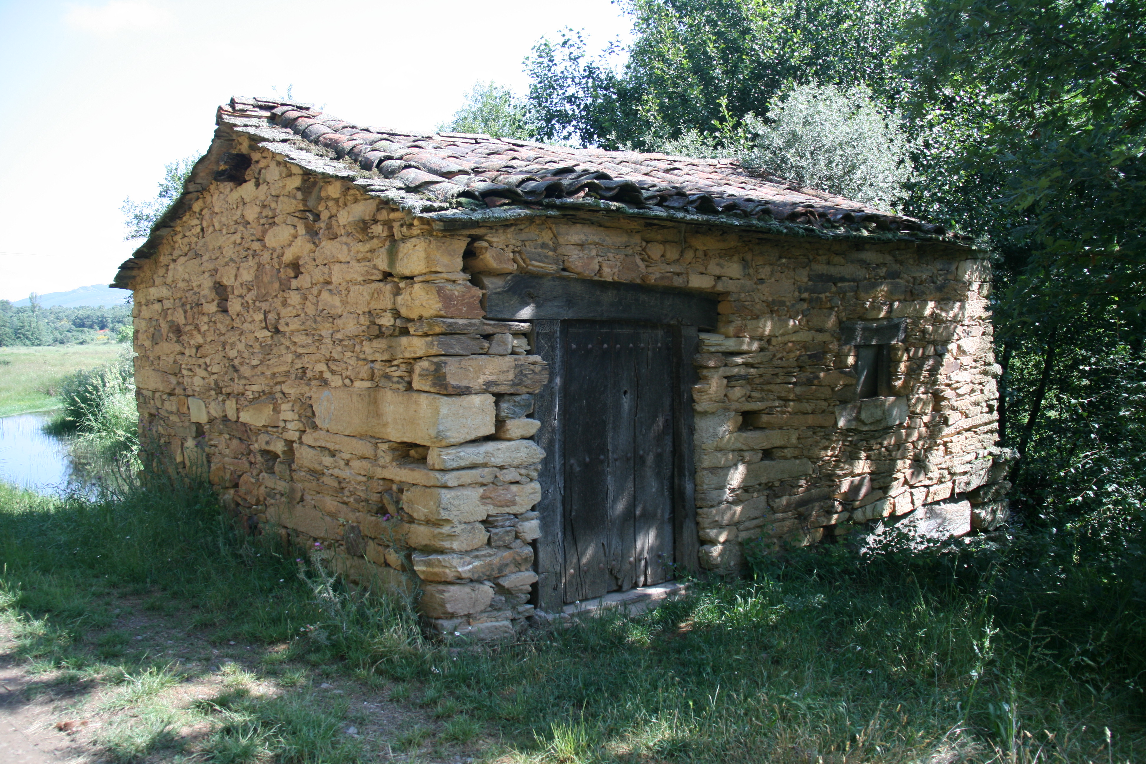 Molino de Agua - Pobladura de Aliste ("La Rebotina")